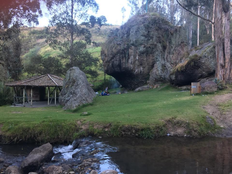 Esta piedra es una atracción turística del cantón Chordeleg, se encuentra junto a una cascada denominada "Canoita".